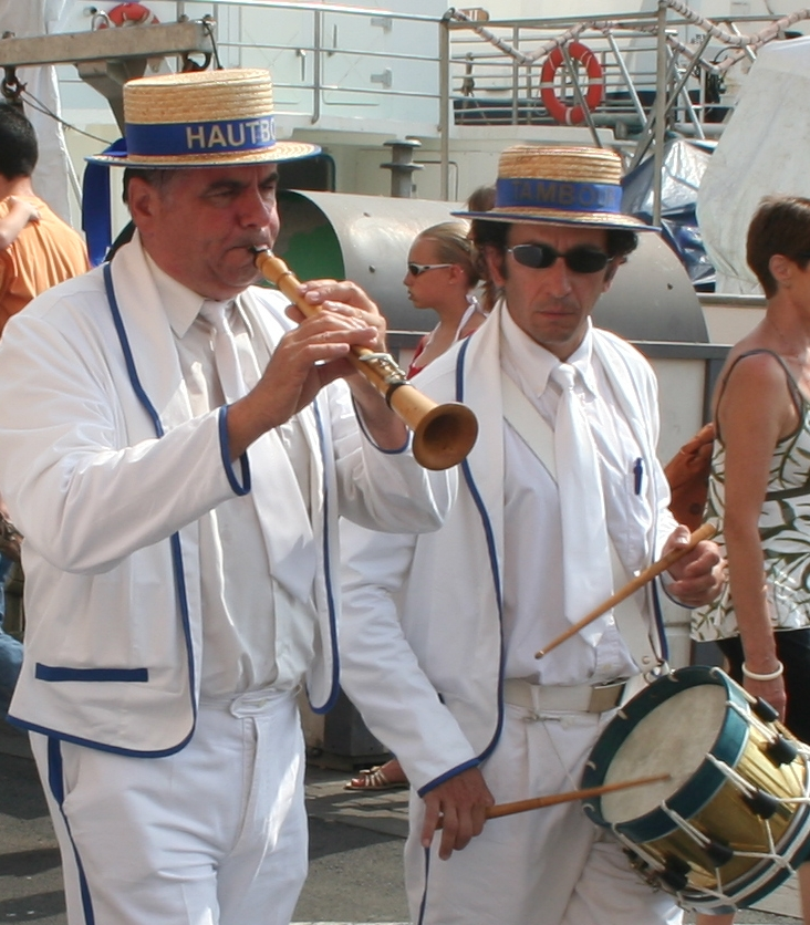 Sète (Hérault)- Fêtes de la Saint-Pierre - musique traditionnelle des joutes : hautbois et tambours.